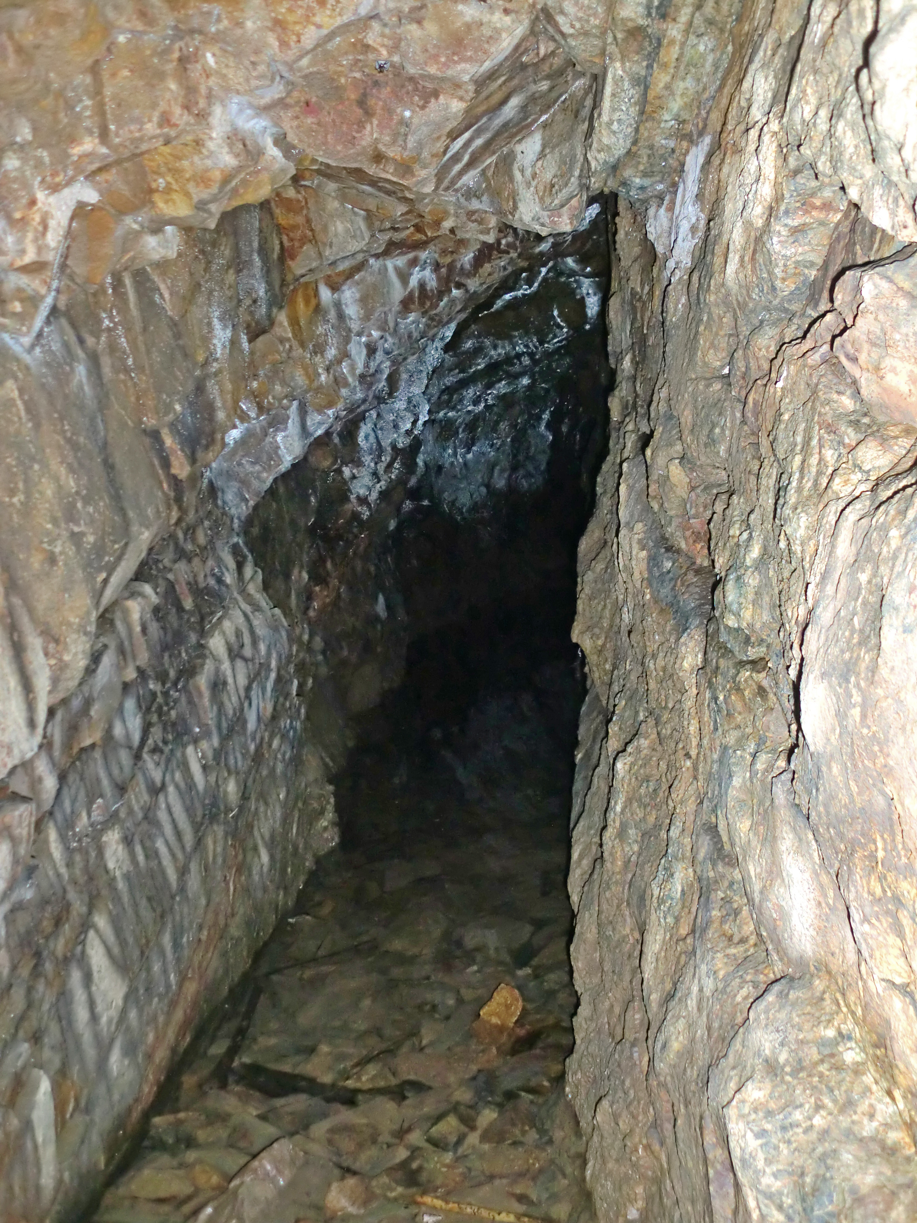 Ancienne galerie noyée.